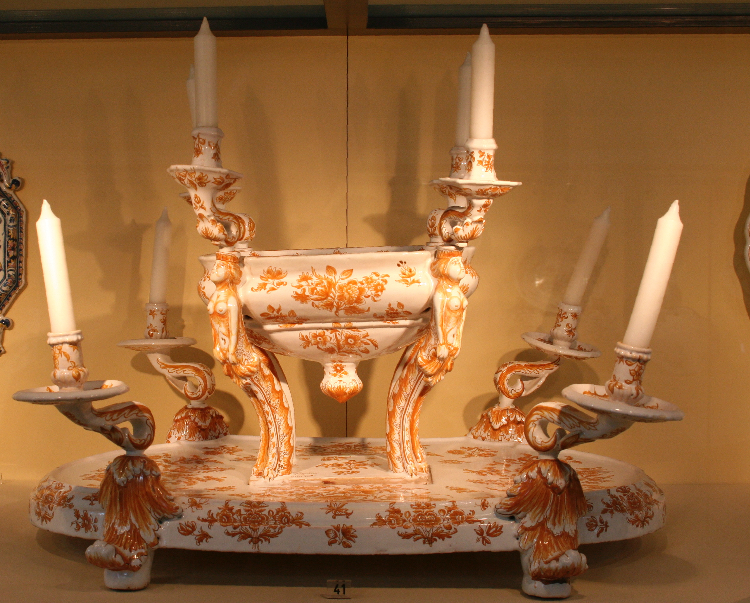 Musée de la faïence à Marseille. Surtout de table à 8 bras de lumière des ateliers Joseph Fauchier vers 1755/1765. Faïence stannifère décor grand feu camaïeu ocre jaune. Hauteur=42cm. Longueur=66cm. largeur=46cm.